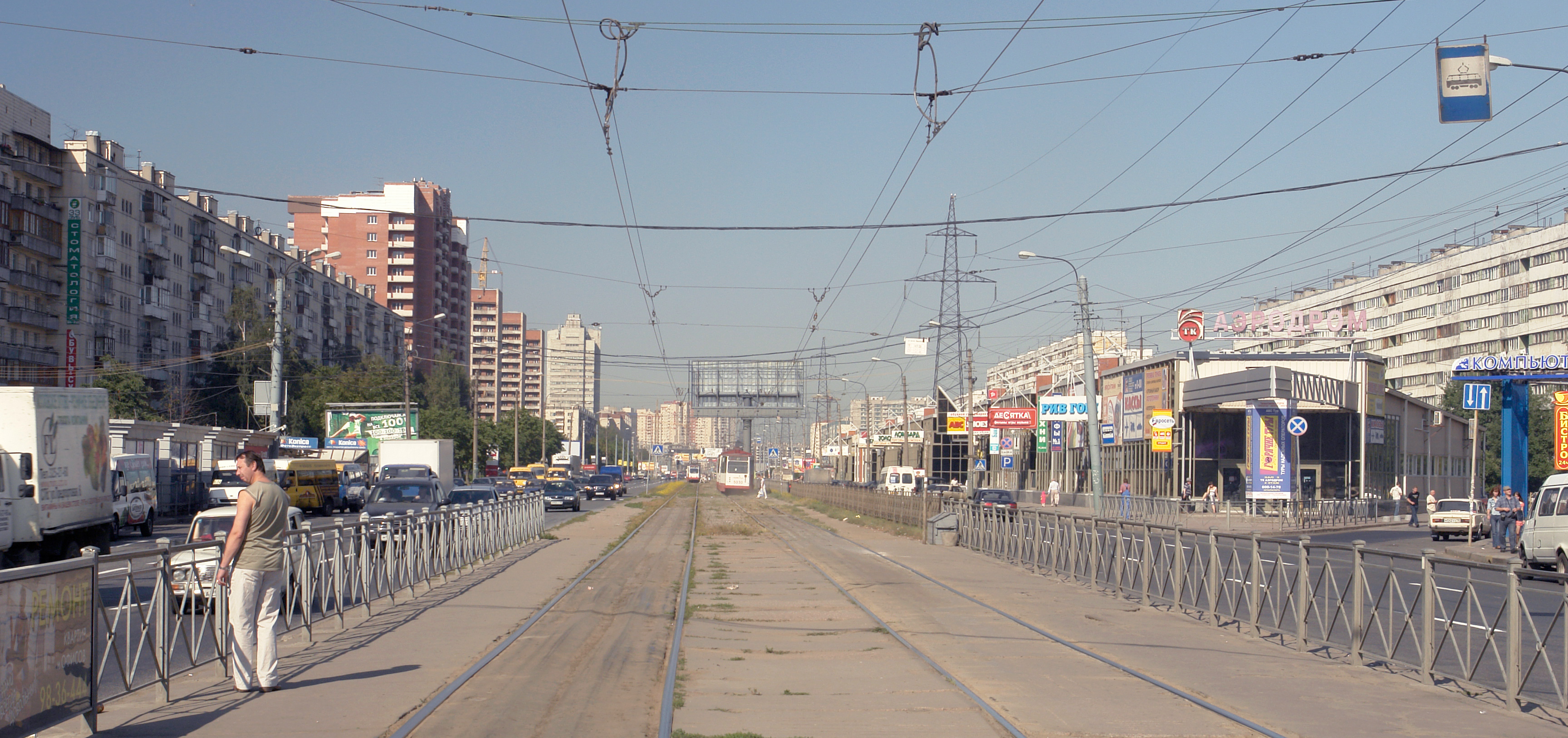 Проспект Испытателей (Санкт-Петербург), вид с перекрёстка с Коломяжским проспектом.